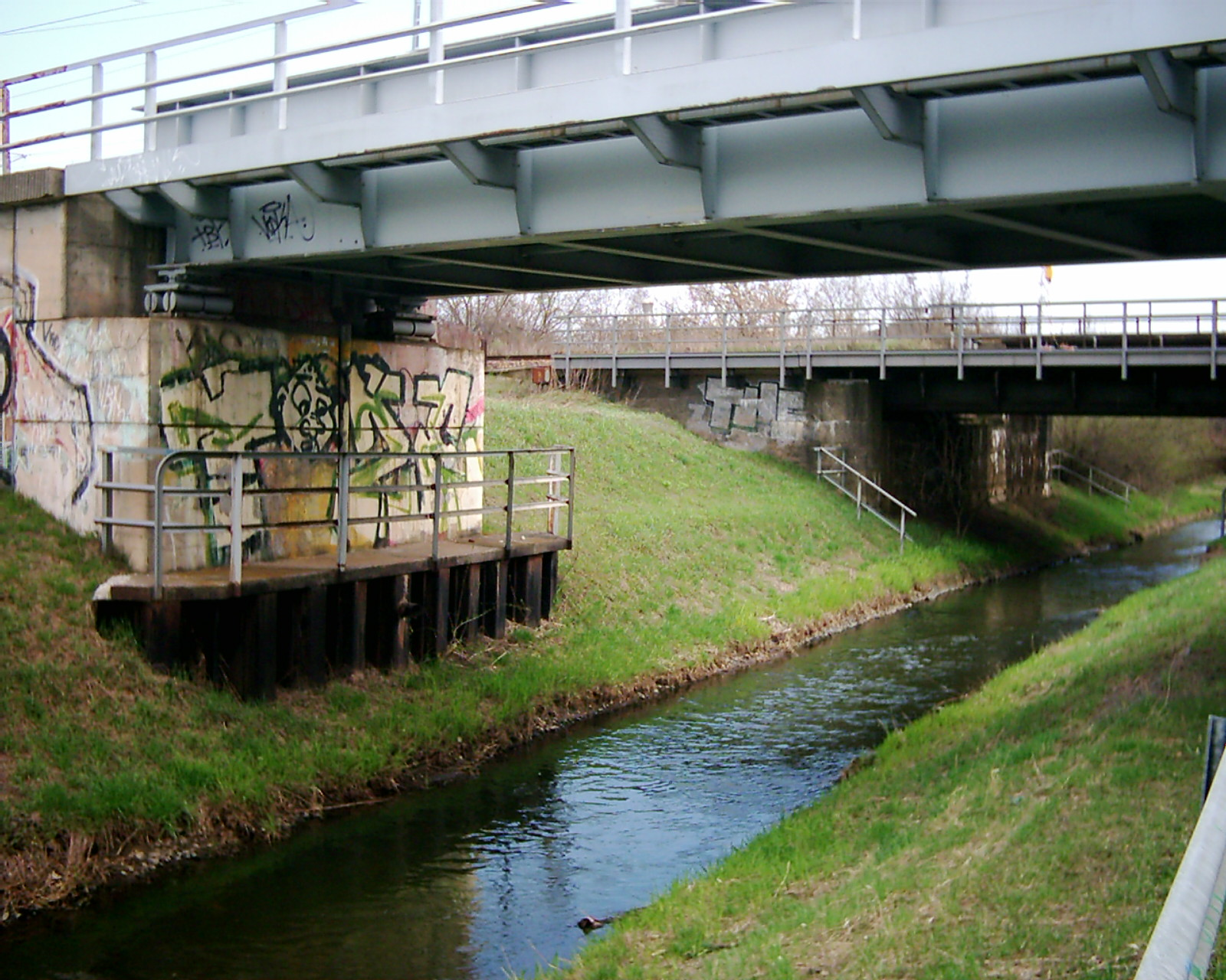 Die Panke durchfließt auf ihrem Wege von der Quelle in Bernau/b. Berlin zur Mündung in die Spree in Berlin-Mitte besiedeltes Gebiet und durchfließt deshalb viele Brücken und Überführungen. Die Flaischlenbrücke ist eine Bahnbrücke aus drei parallelen Brückenteilen, der südöstliche etwa 17 Meter von den anderen beiden entfernt, dafür mit einem Fußsteig versehen. Überführen den Pankewanderweg und die Panke. Die Längen betragen im Mittel 19 Meter, die Breiten 12 Meter und 4,2 Meter. Im Bild die 3 Brücken flussaufwärts gesehen.